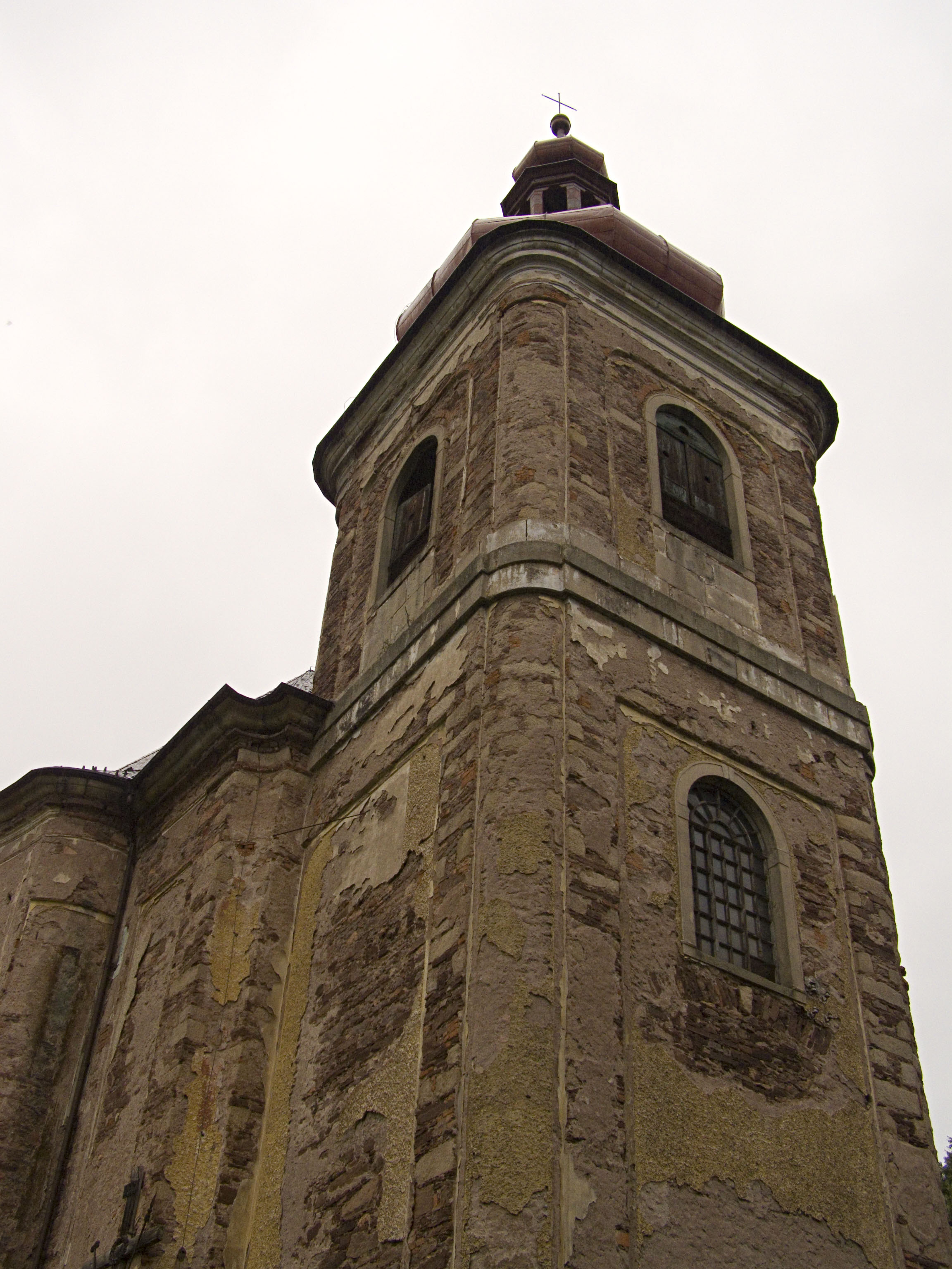 Heřmánkovice, Kostel Všech svatých